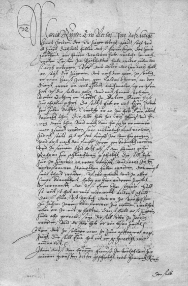 Extrait du dossier judiciaire concernant l'empoisonnement d'Hans Jorden par Eve Zerzuben. Archives de la Bourgeoisie de Viège - F13, fascicule n°3. Témoignage de Marie Rytter, veuve d'Hans Jorden, l'empoisonné. 29 septembre 1607